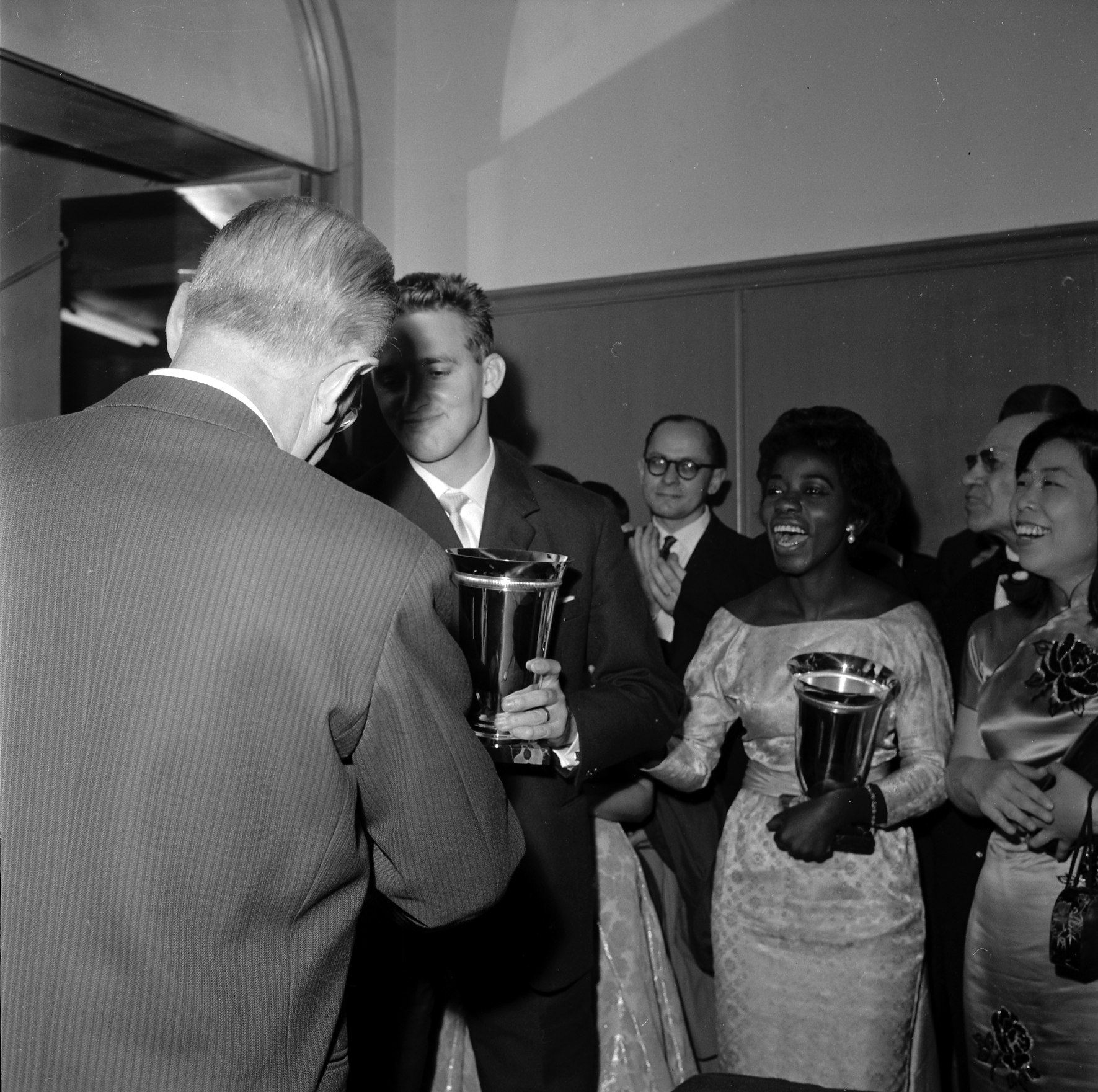 Théâtre du Capitole. Le 12 Octobre 1963. Vue de la remise des prix pour les lauréats du concours de chant au théâtre du Capitole.